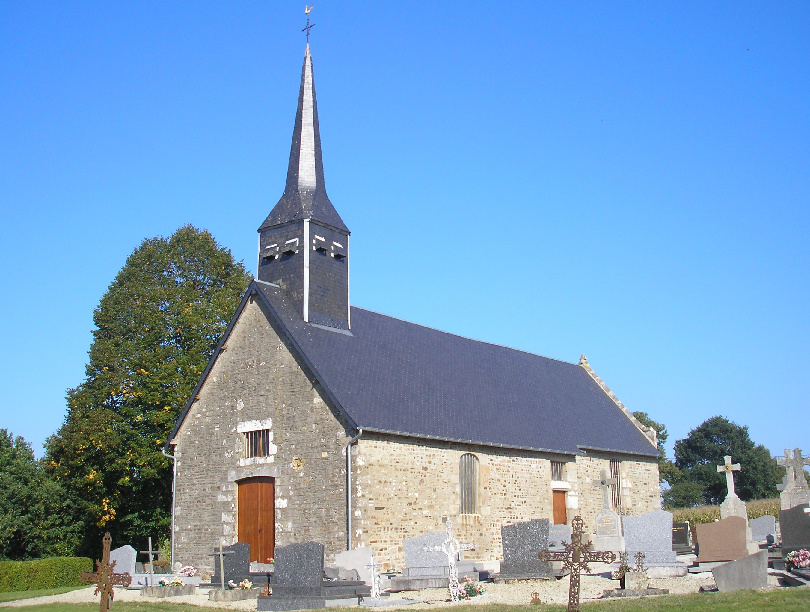 Sainte-Marie-du-Bois (Normandie, France). L'église Notre-Dame.